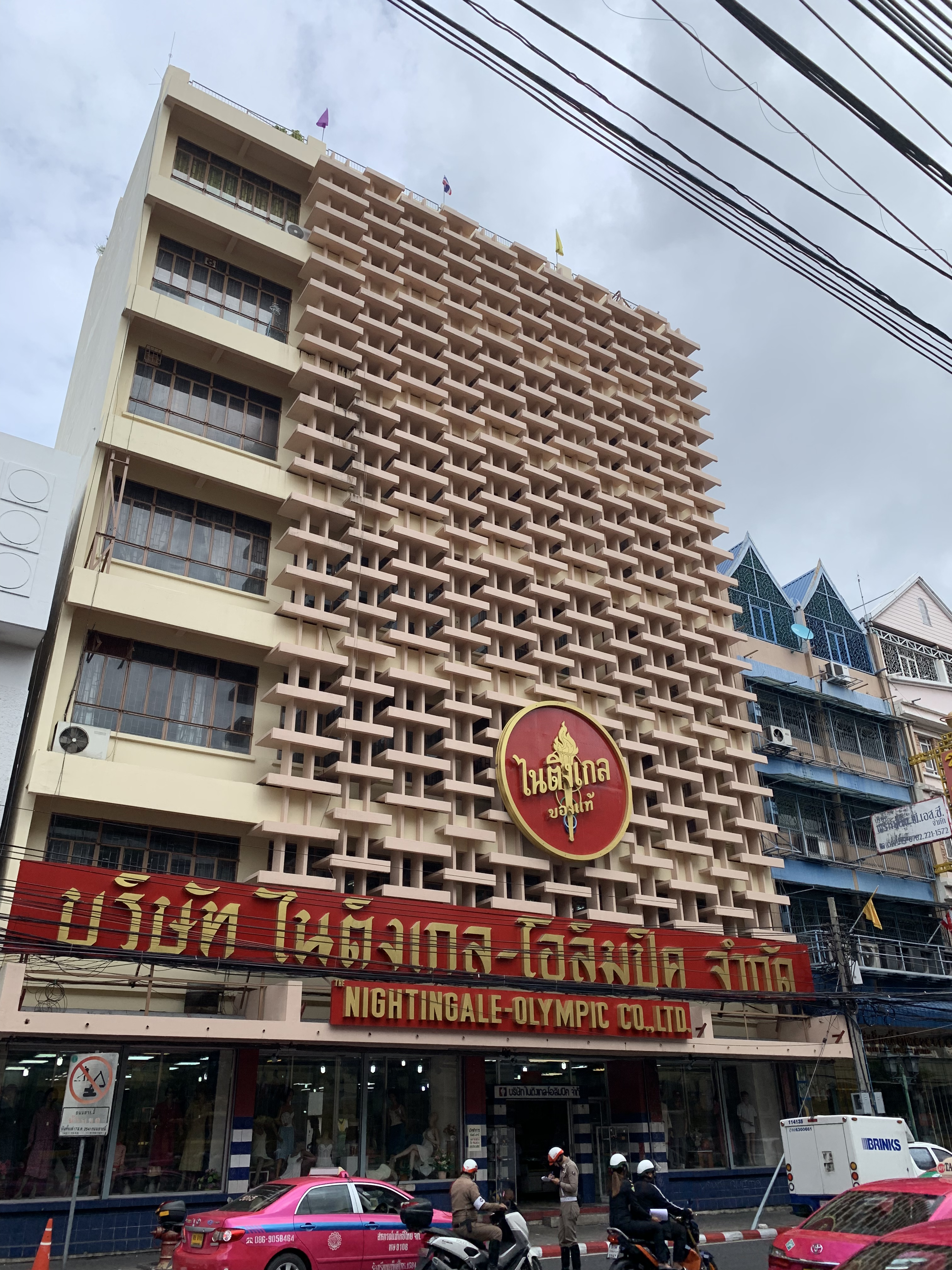 ห้างไนติงเกล-โอลิมปิก 2019